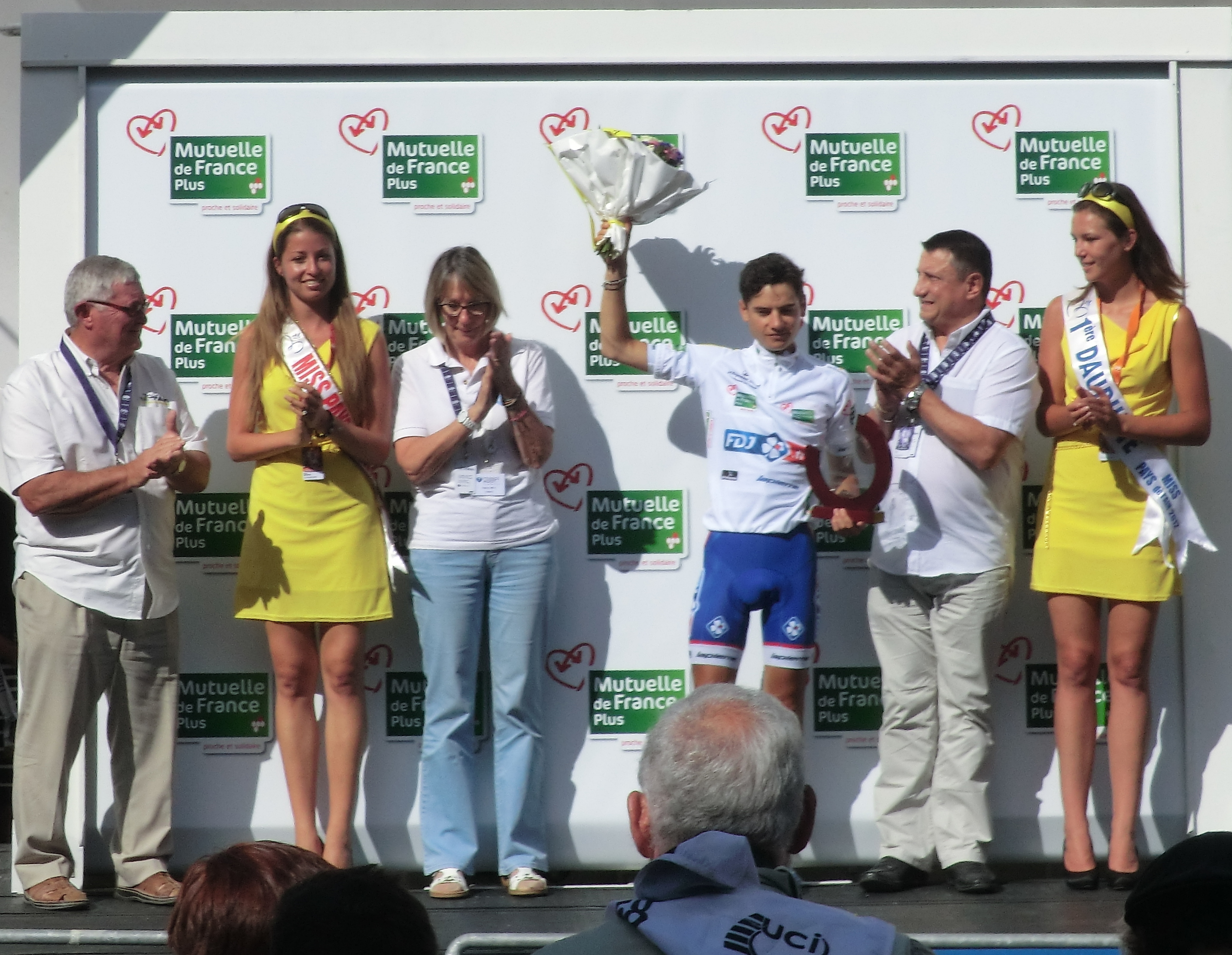 Podiums du Tour de l'Ain 2013, à l'issue de la dernière étape à Belley.